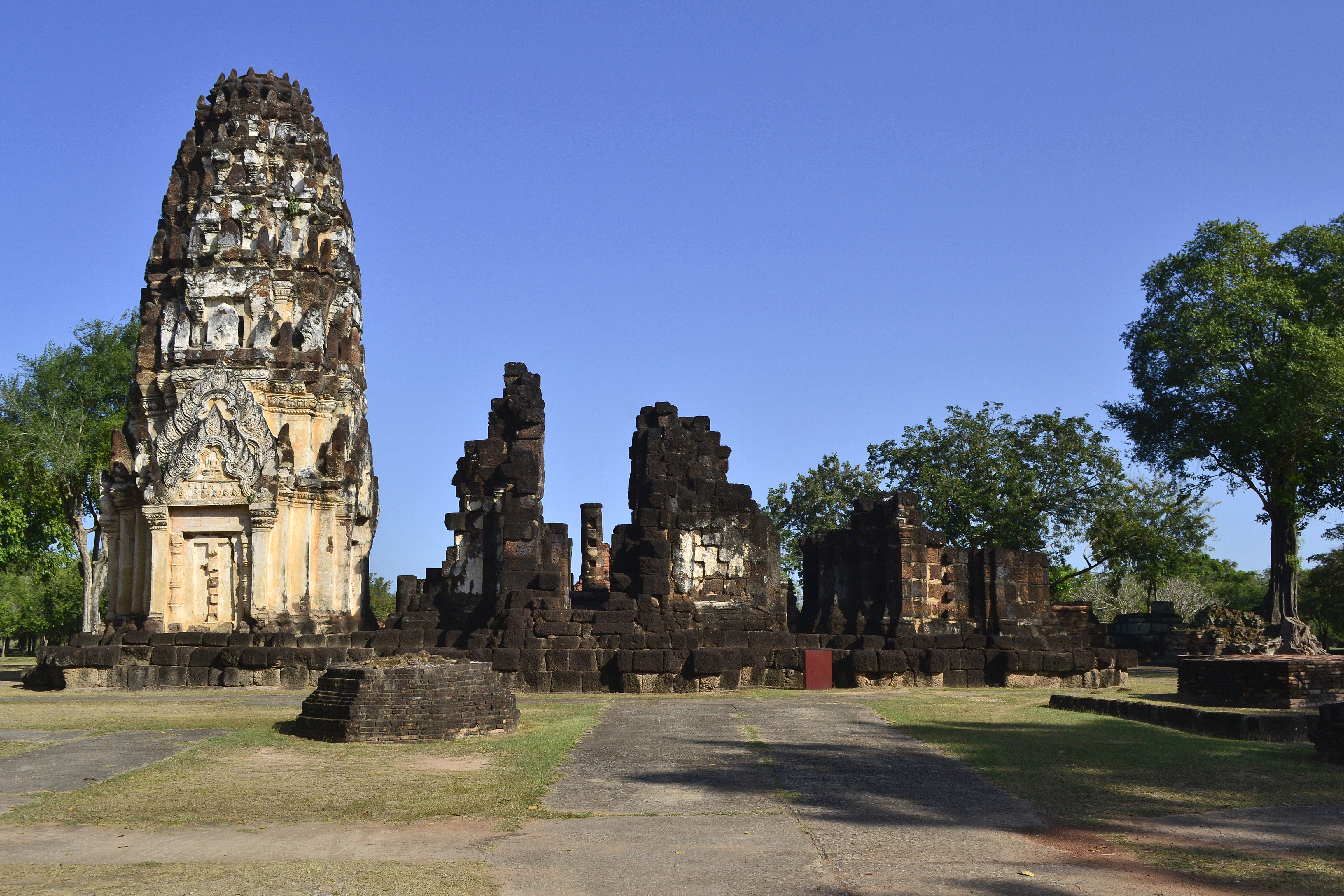 Wat Phra Phai Luang im Geschichtspark Sukhothai